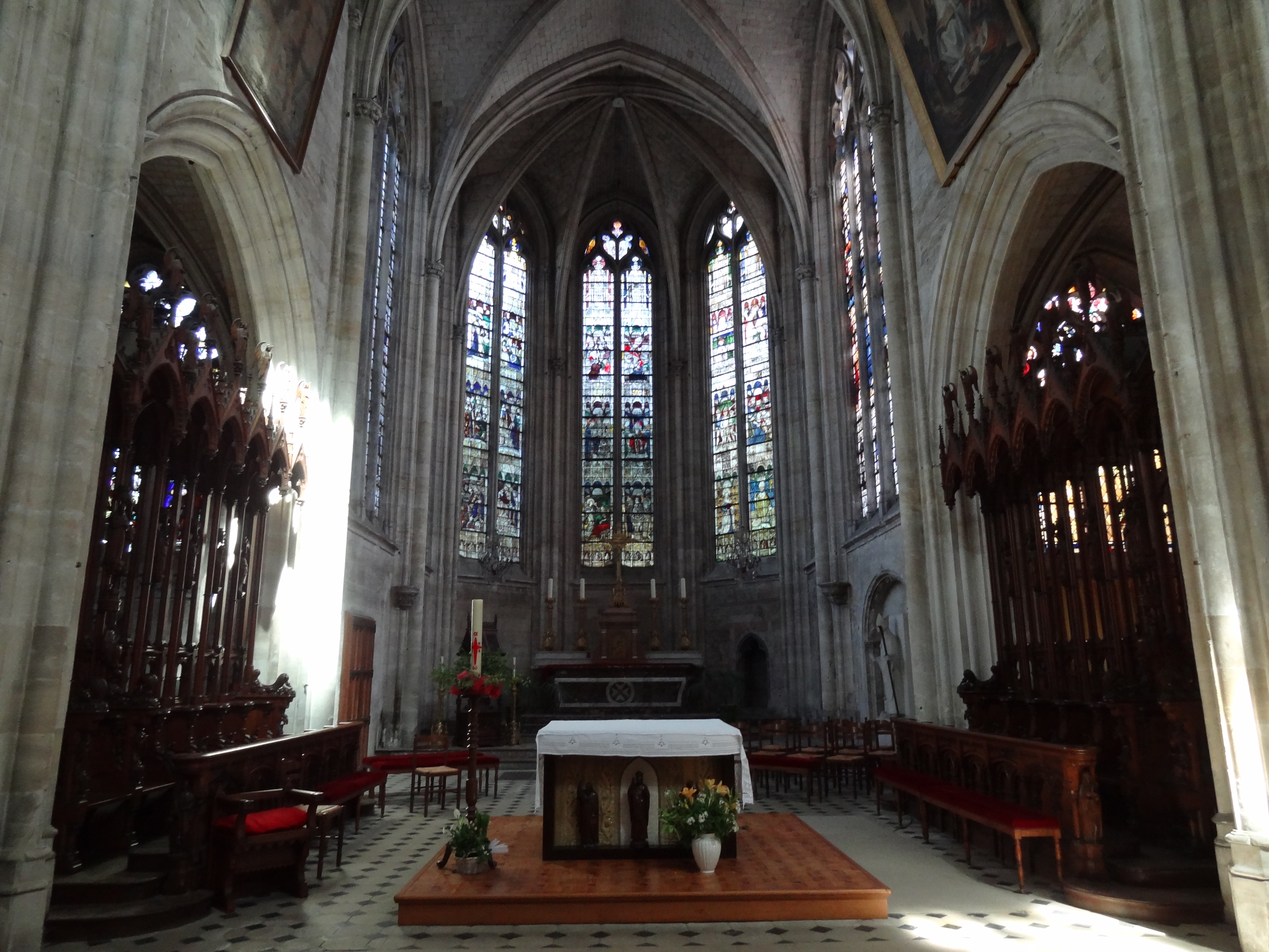 Église Saint-Taurin d'Évreux, chœur de style gothique (XVe siècle). This building is en partie classé, en partie inscrit au titre des Monuments Historiques. .